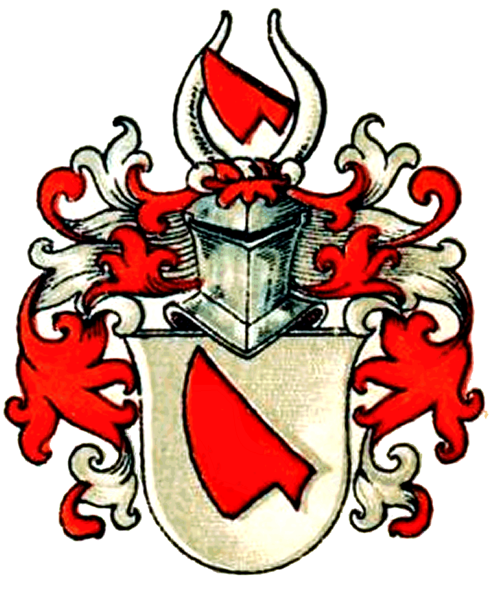 Stammwappen derer von Sandersleben